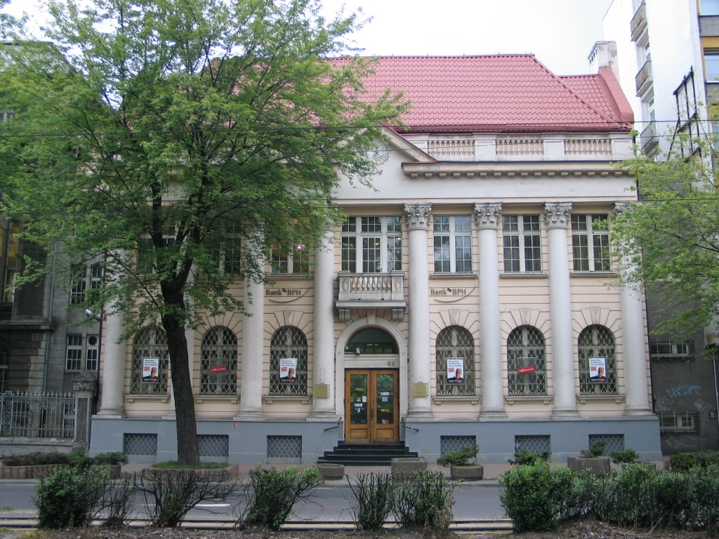 Bank przy alei Kościuszki 63 Łódź